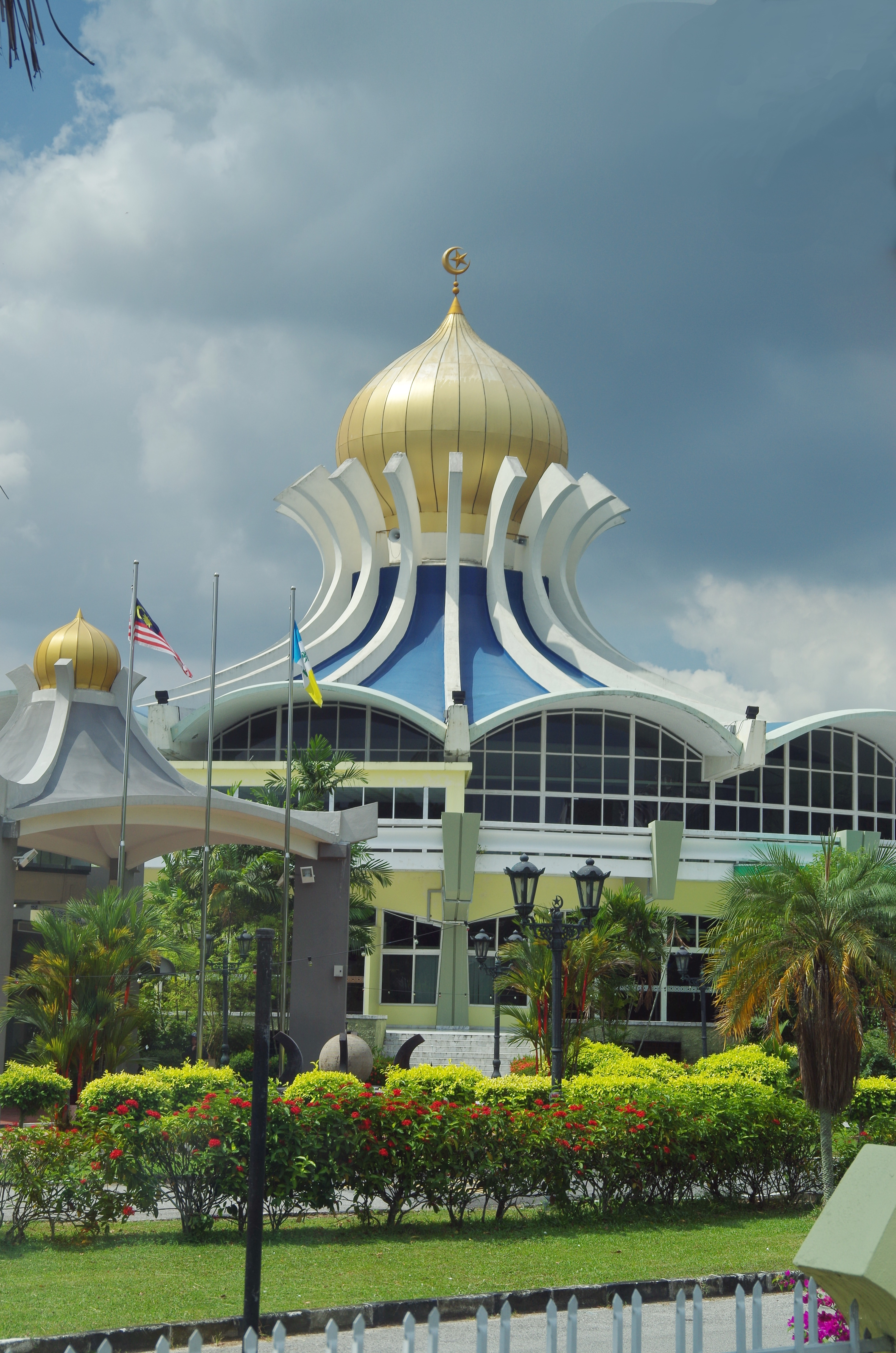 Masjid Negeri, Georgetown, Penang